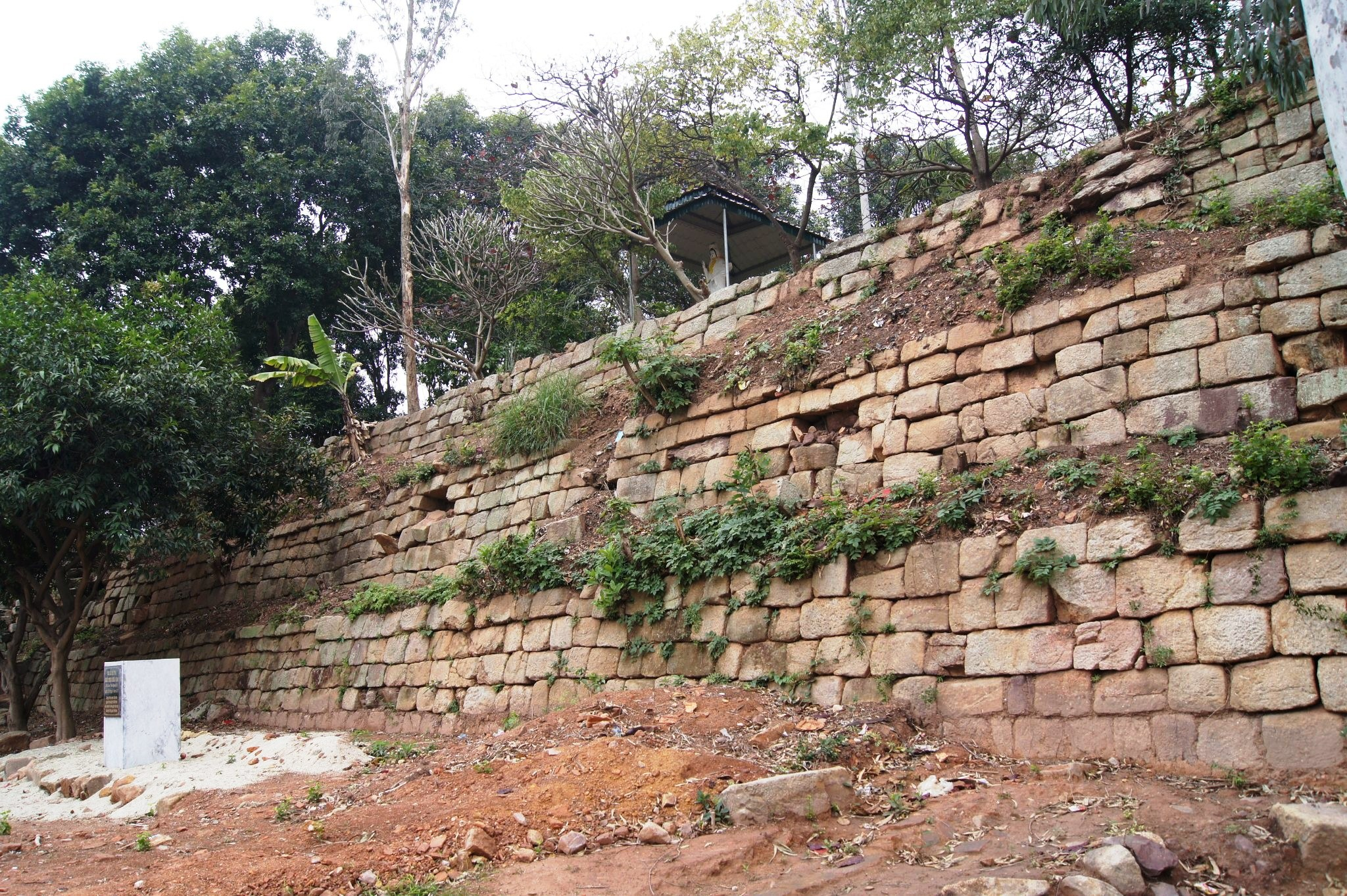 Bậc nền được bó bằng những tảng đá xếp chồng lên nhau ở Chùa Dạm, Bắc Ninh